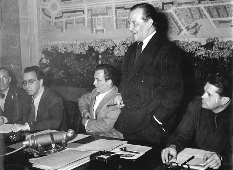 8.4.1952 Pressekonferenz mit den Architekten des Nationalen Aufbauprogramms Am 8.4.1952 fand im Steinsaal des Hauses des Nationalrates eine Pressekonferenz der Deutschen Bauakademie mit Vertretern der demokratischen Presse stattt. Nach den einleitenden Worten von Prof. Dr. Liebknecht beantworteten die Leiter der Kollektive die Fragen der Pressevertreter über die Neubauten an der Stalinallee. ADN Nr. 1153 UBz: v.r.n.l. Prof. Paulick, Prof. Henselmann, Prof. Dr. Liebknecht.